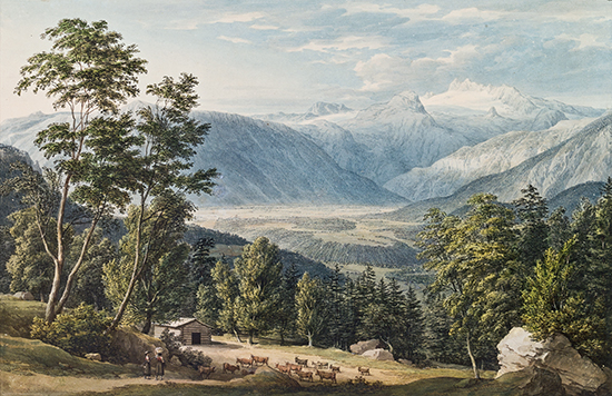 GAUERMANN, Jakob (1773 – 1843): Blick auf den Dachstein bei Altaussee 1815